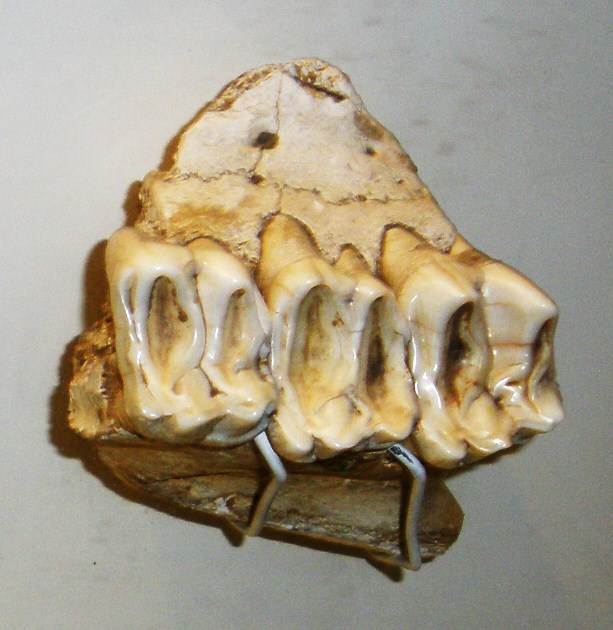 Fossil of Megatapirus, an extinct mammal-- Took the photo at Natural History Museum, London